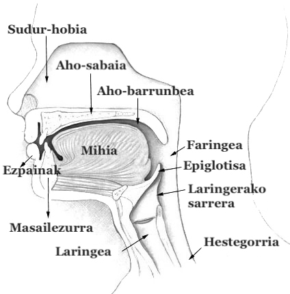 Burua eta lepoa